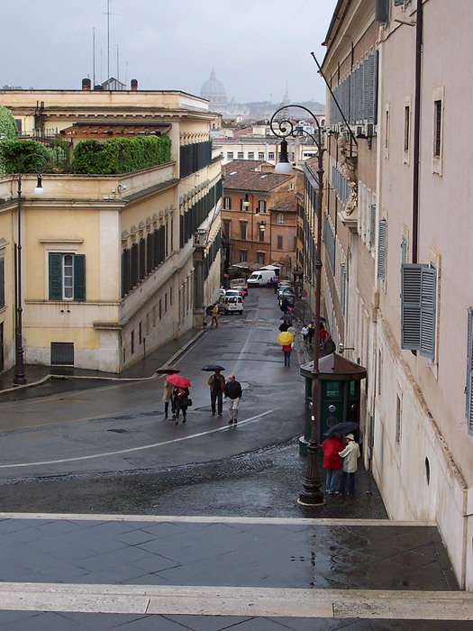 Roma - Via della Dataria